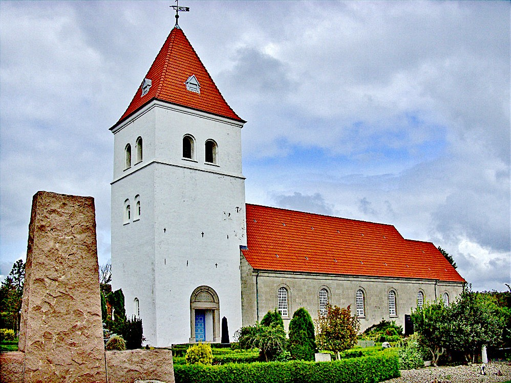 fra sydvest